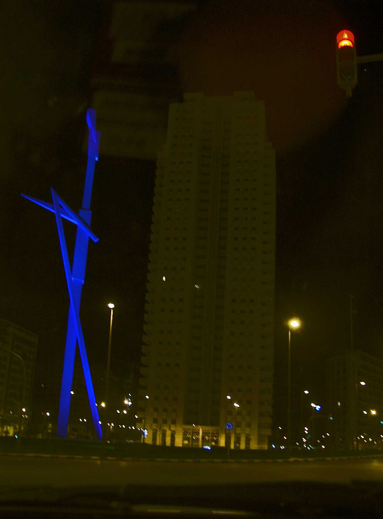 El Parotet, en Valencia, una escultura de Miquel Navarro. y algún claxon entre los semáforos...